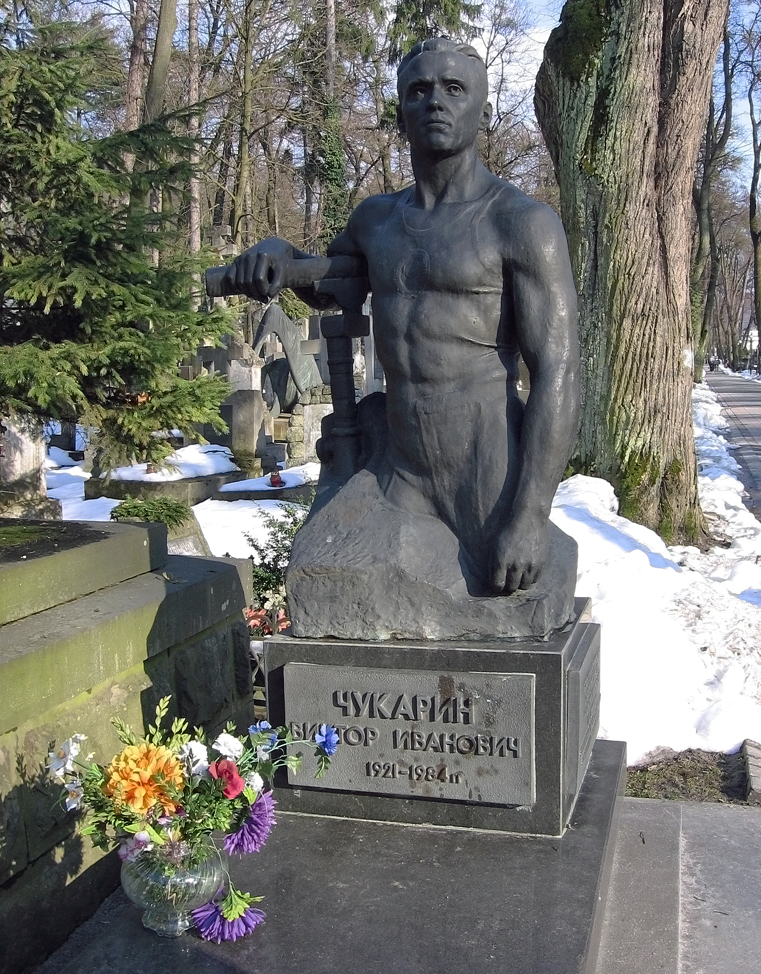 Львів, вул. Мечнікова, Личаківське кладовище, поле 4